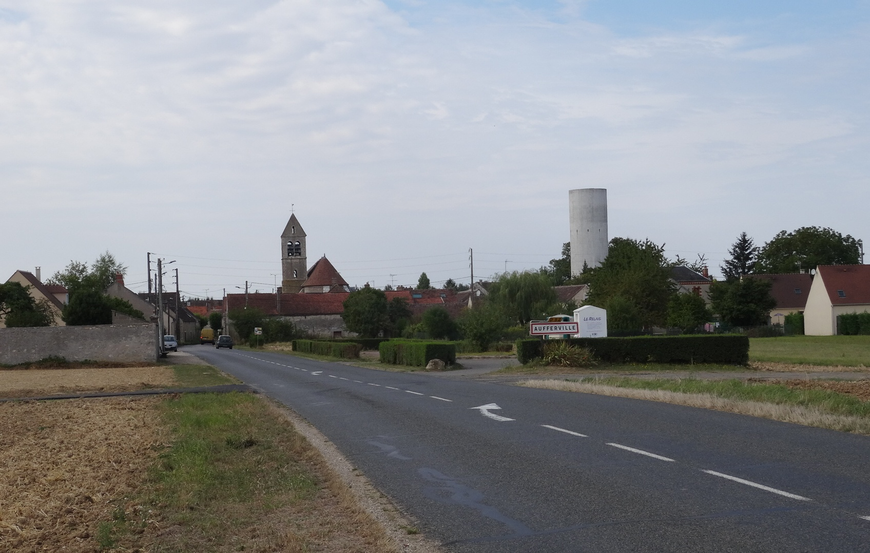 Le village d'Aufferville. (Seine-et-Marne, région Île-de-France).